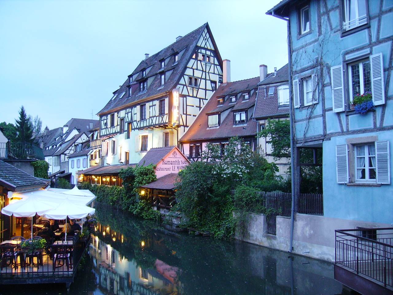 Colmar, Alsace, France, la Petite Venise